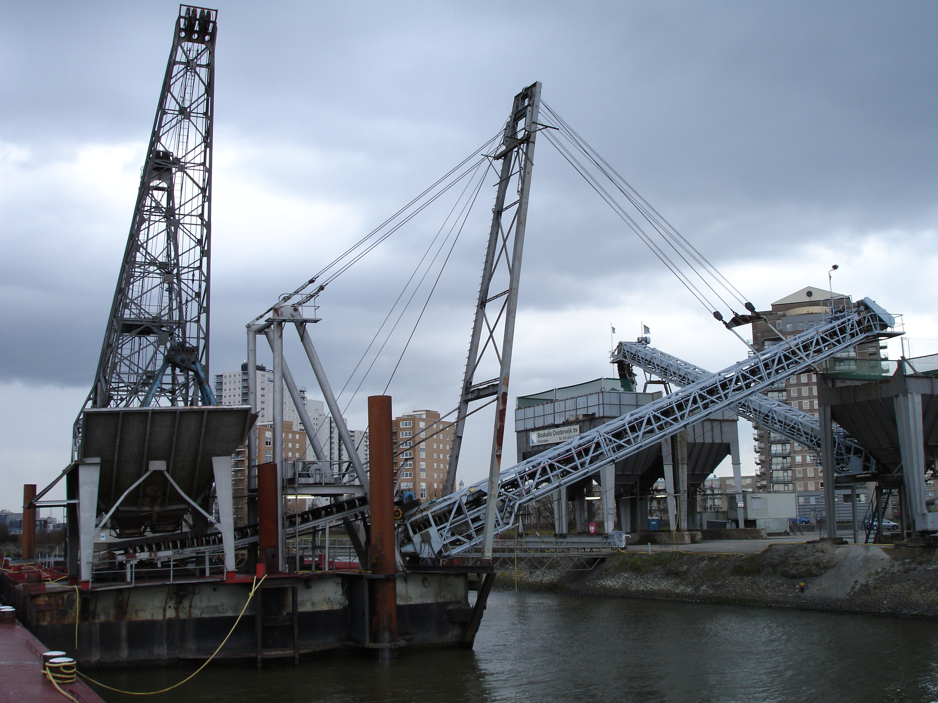 Losplaats Nesserdijk Rotterdam